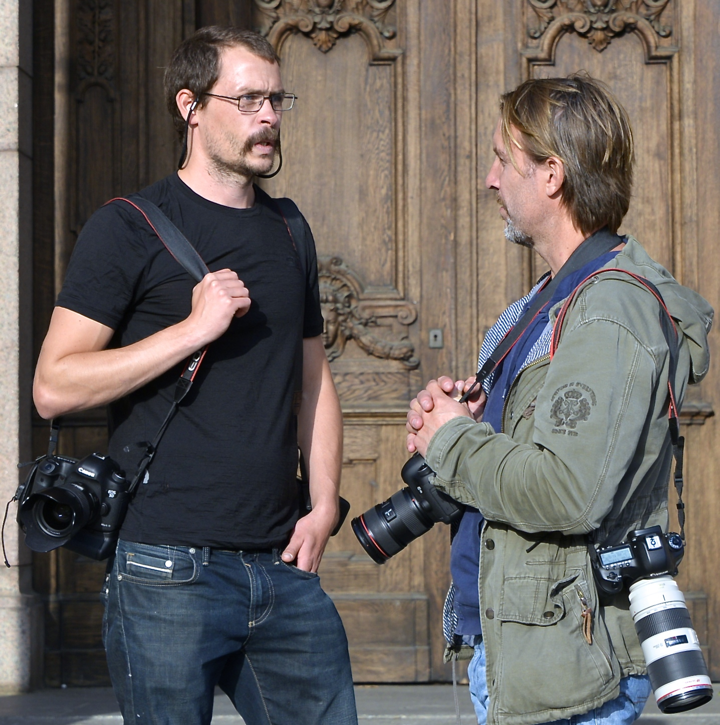 Johan Persson och Niclas Hammarström på uppdrag i samband med en demonstration i Stockholm av Svenskarnas parti den 30 augusti 2014.